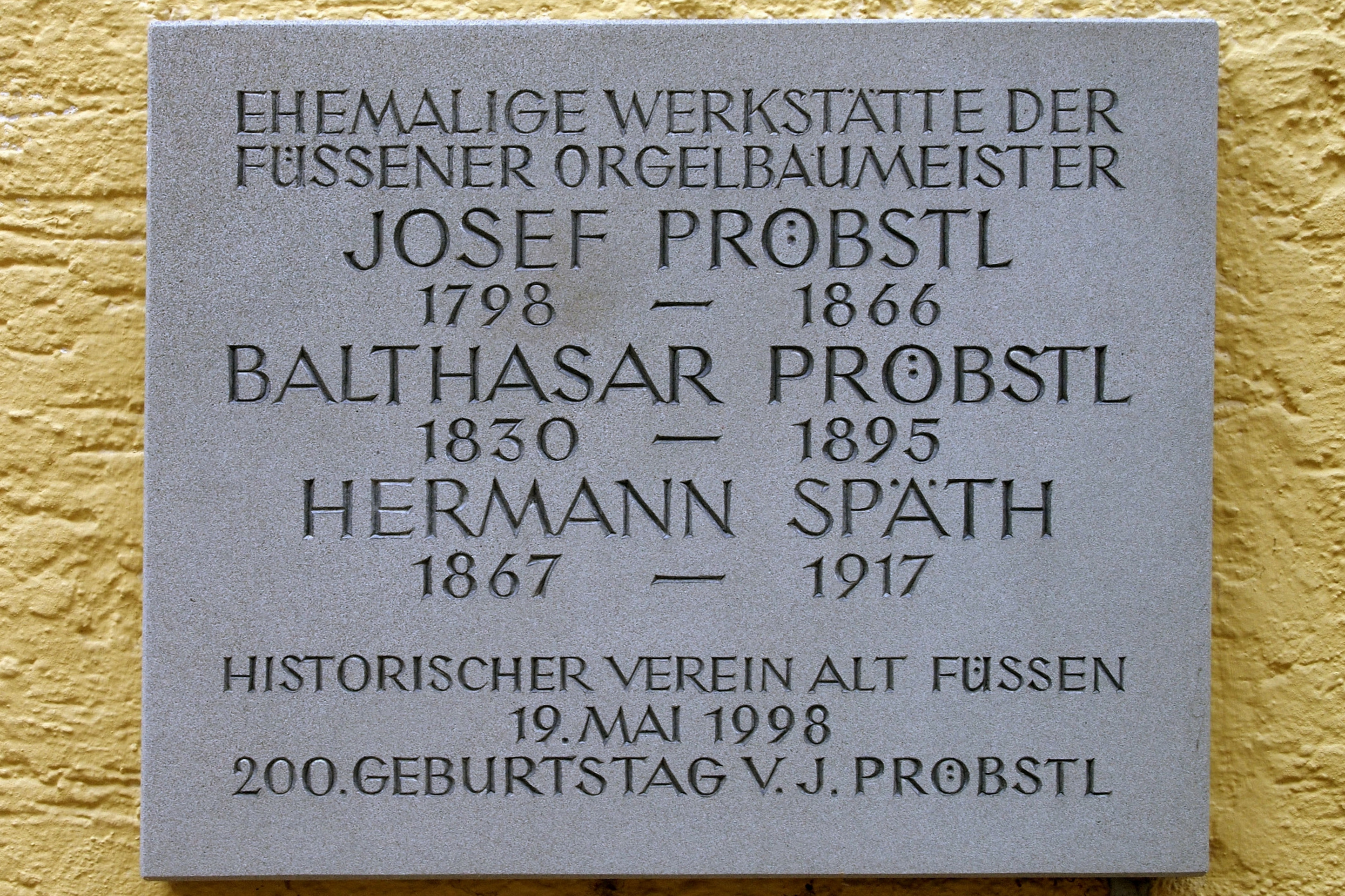 Füssen, Ritterstrasse 14, Hinweistafel auf die Werkstätte der Orgelbaumeister Josef Pröbstl, Balthasar Pröbstl und Hermann Späth